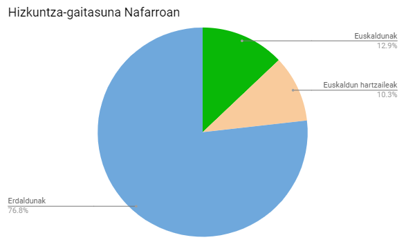 Nafarroako hizkuntza-gaitasuna, 2016ko ikerketa soziolinguistikoaren arabera.